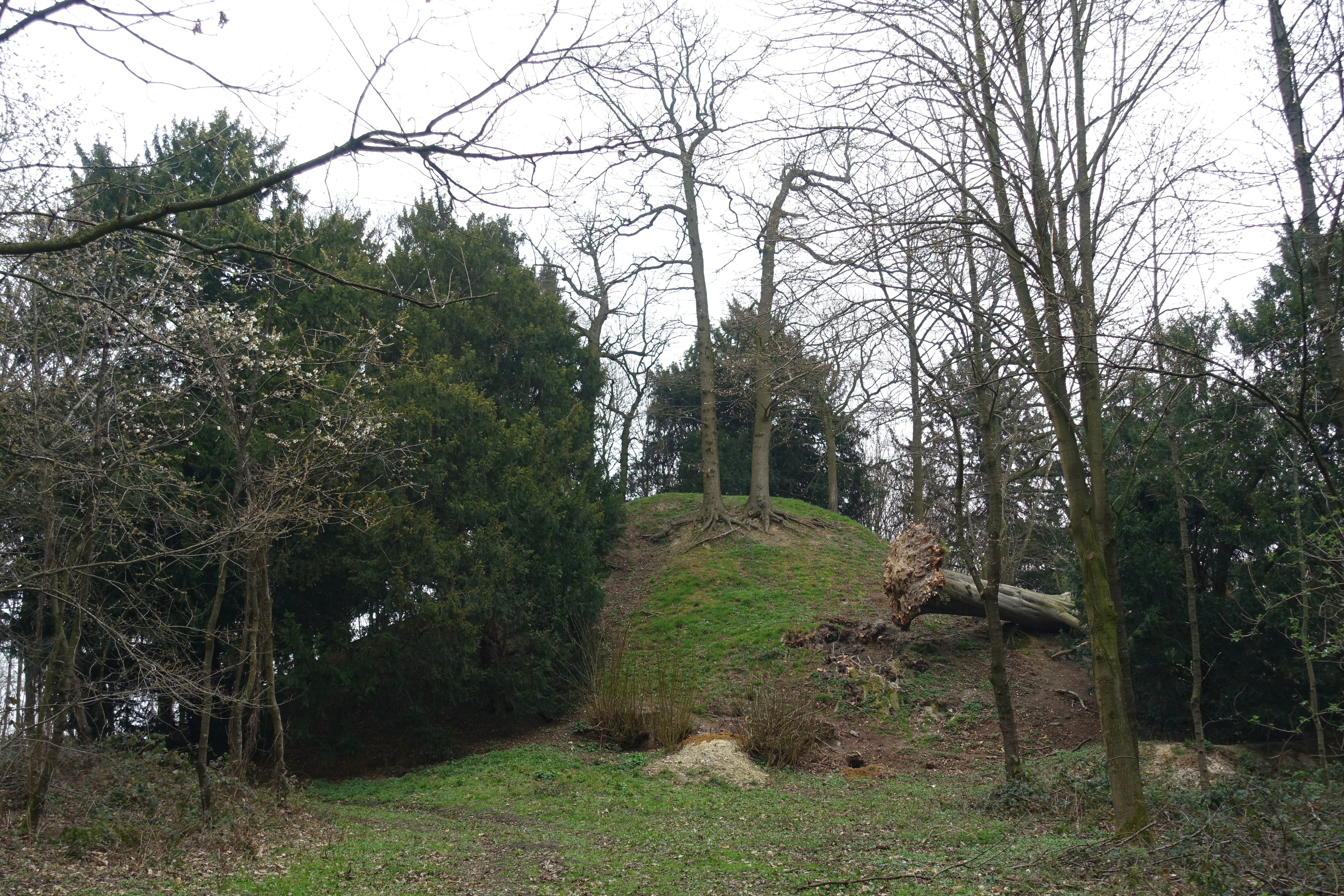 Tumulus in Grootbos Herderen (Op den Drinkaert), Riemst, België